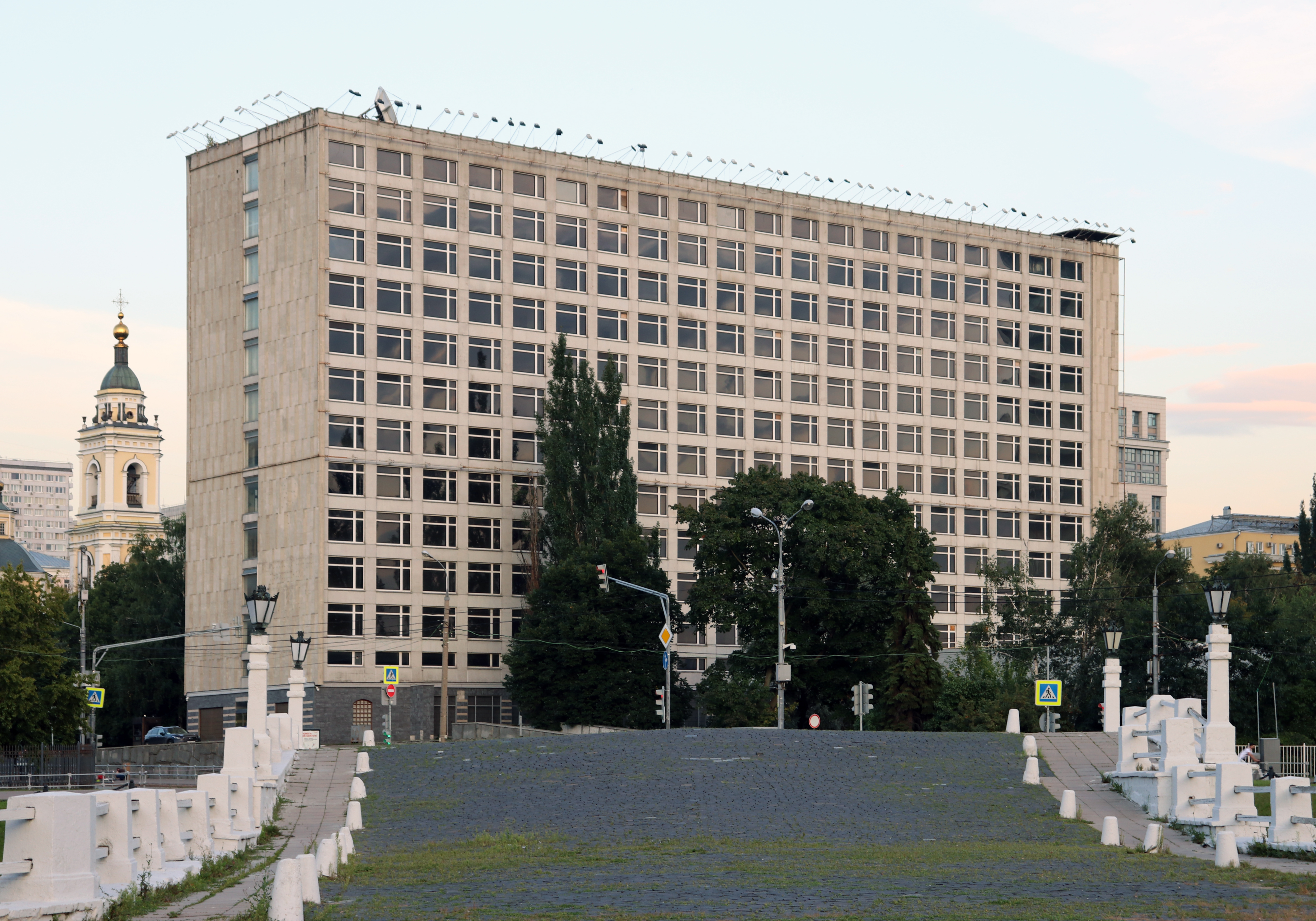 Бывшая гостиница "Мир" в Москве.